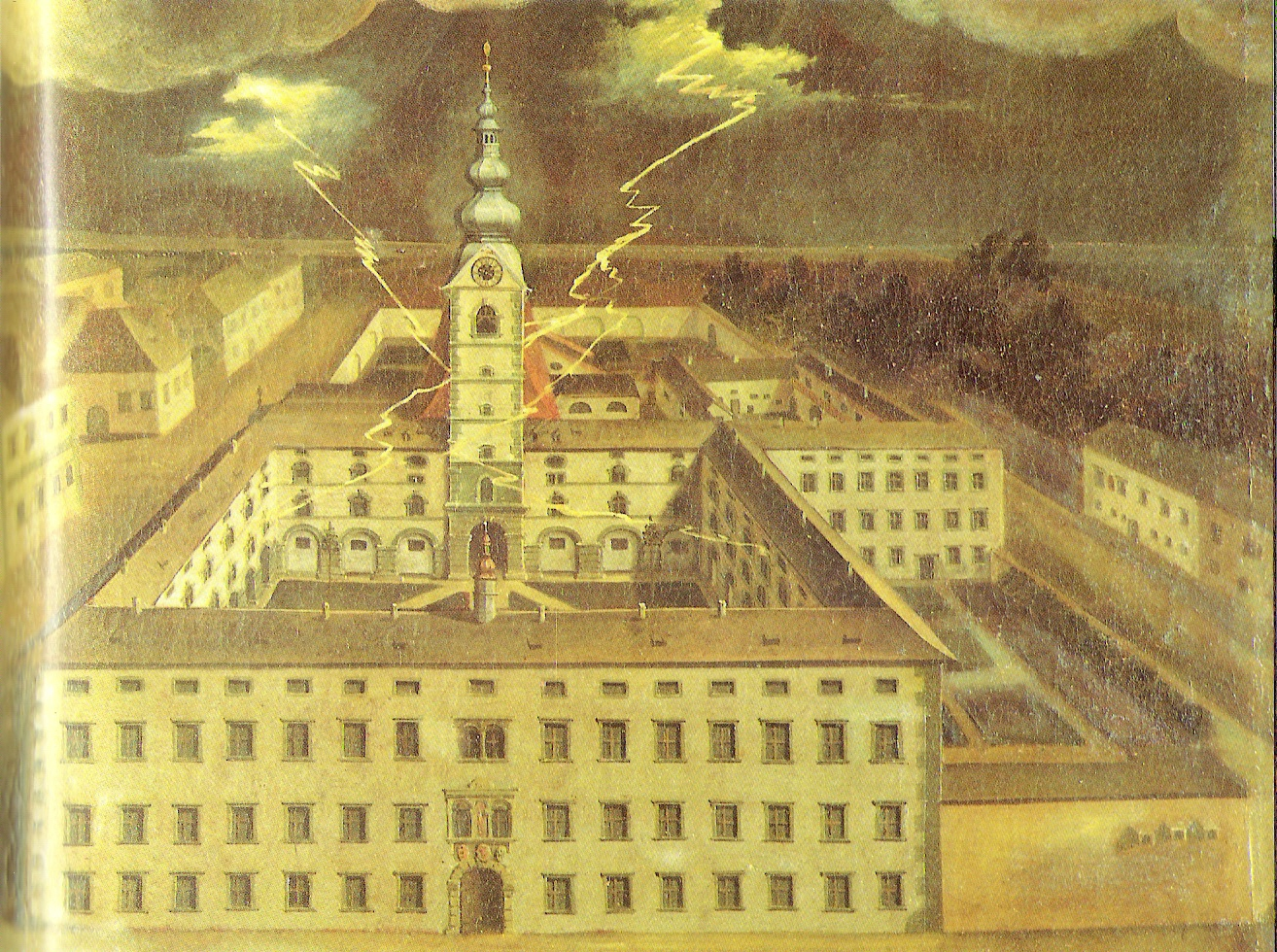 Das ehemalige Bürgerspital (1964 abegrissen) mit der Dreifaltigkeitskirche (heute Dom) zu Klagenfurt. Votivbild (Ausschnitt) in der Kapelle von Schloss Loretto bei Klagenfurt.